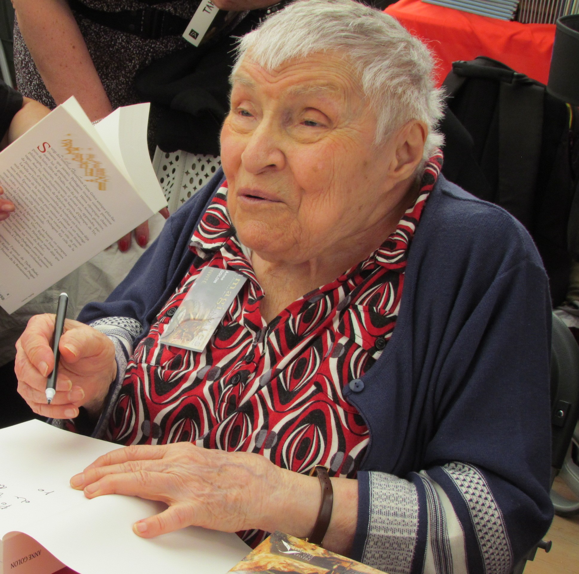 La romancière française Anne Golon en dédicace lors du festival des mondes imaginaires Les Imaginales (13ème édition) en mai 2014 à Epinal (département des Vosges en France).